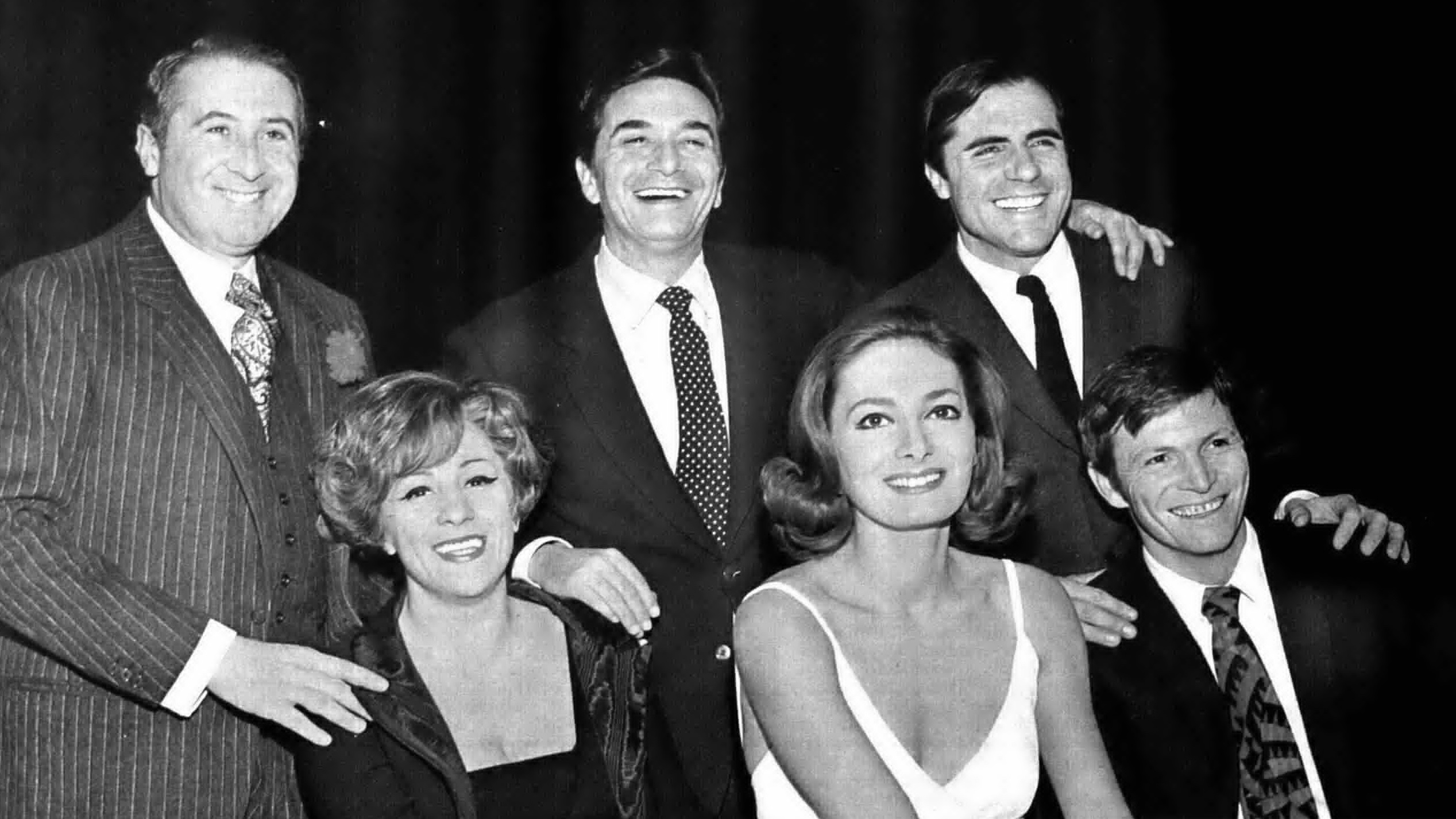 Italian stage company "Compagnia dei giovani"